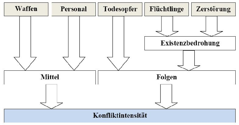 Depicts intensity levels of a political conflict according to the methodology used at Heidelberg Institute for International Conflict Research (HIIK).